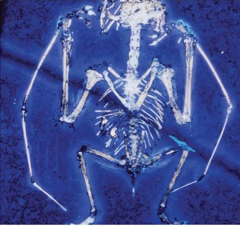 Anurognathus fossil